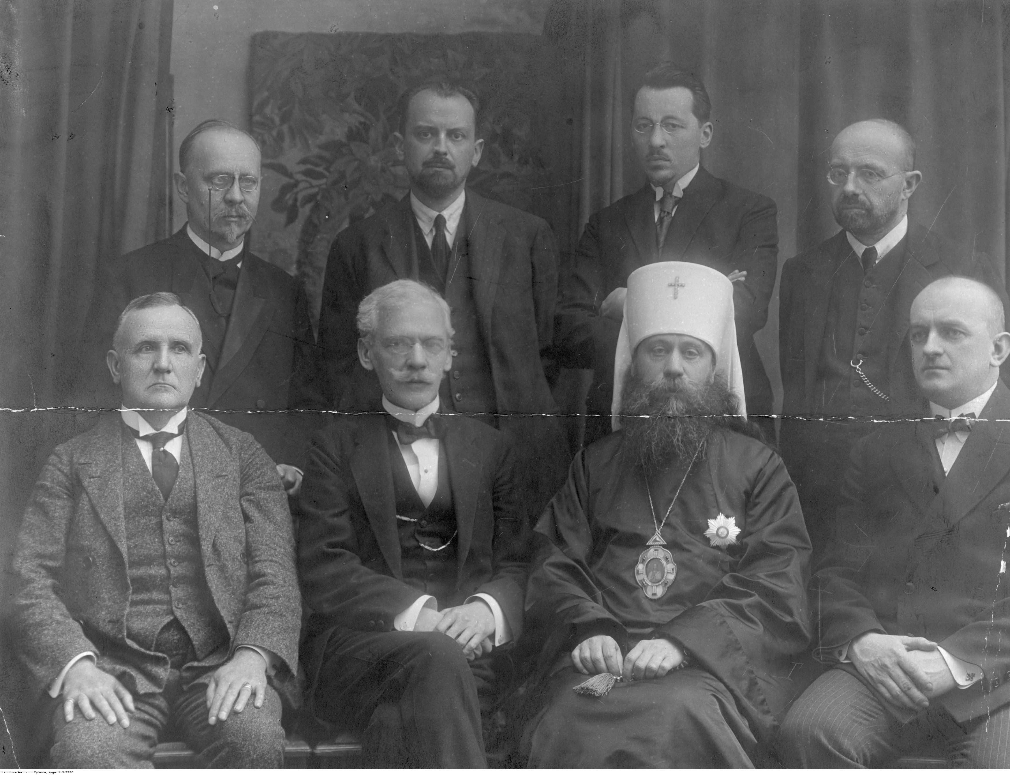 Komisja organizacyjna Studium Teologii Prawosławnej UW: prof. Ignacy Koschembahr-Łysakowski, rektor Uniwersytetu Warszawskiego, prof. Franciszek Kryształowicz, kościelny kurator Studium Teologii Prawosławnej, metropolita Kościoła Prawosławnego w Polsce Dionizy (Waledyński), prof. Eugeniusz Jarra, prof. Jan Porzeziński, prof. Wacław Makowski, prof. Franciszek Czubalski, prof. Kazimierz Nitsch.